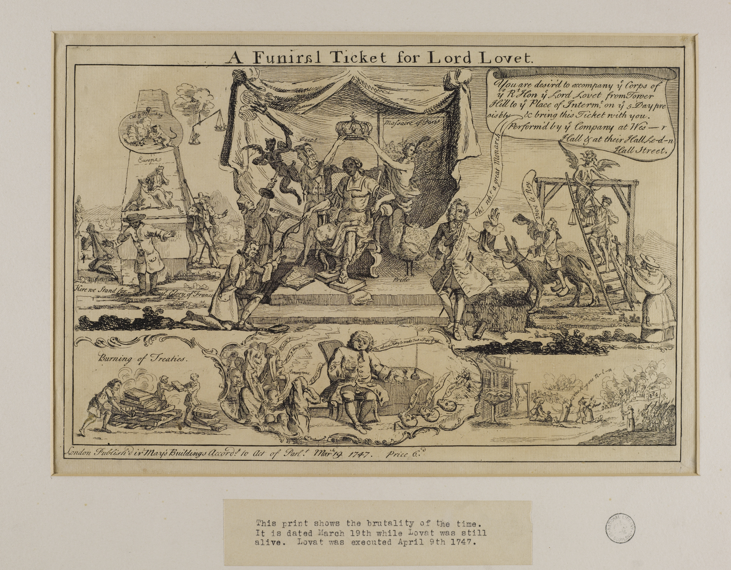 Lord Lovat (c. 1667-1747) 8 1/2x 12 3/4